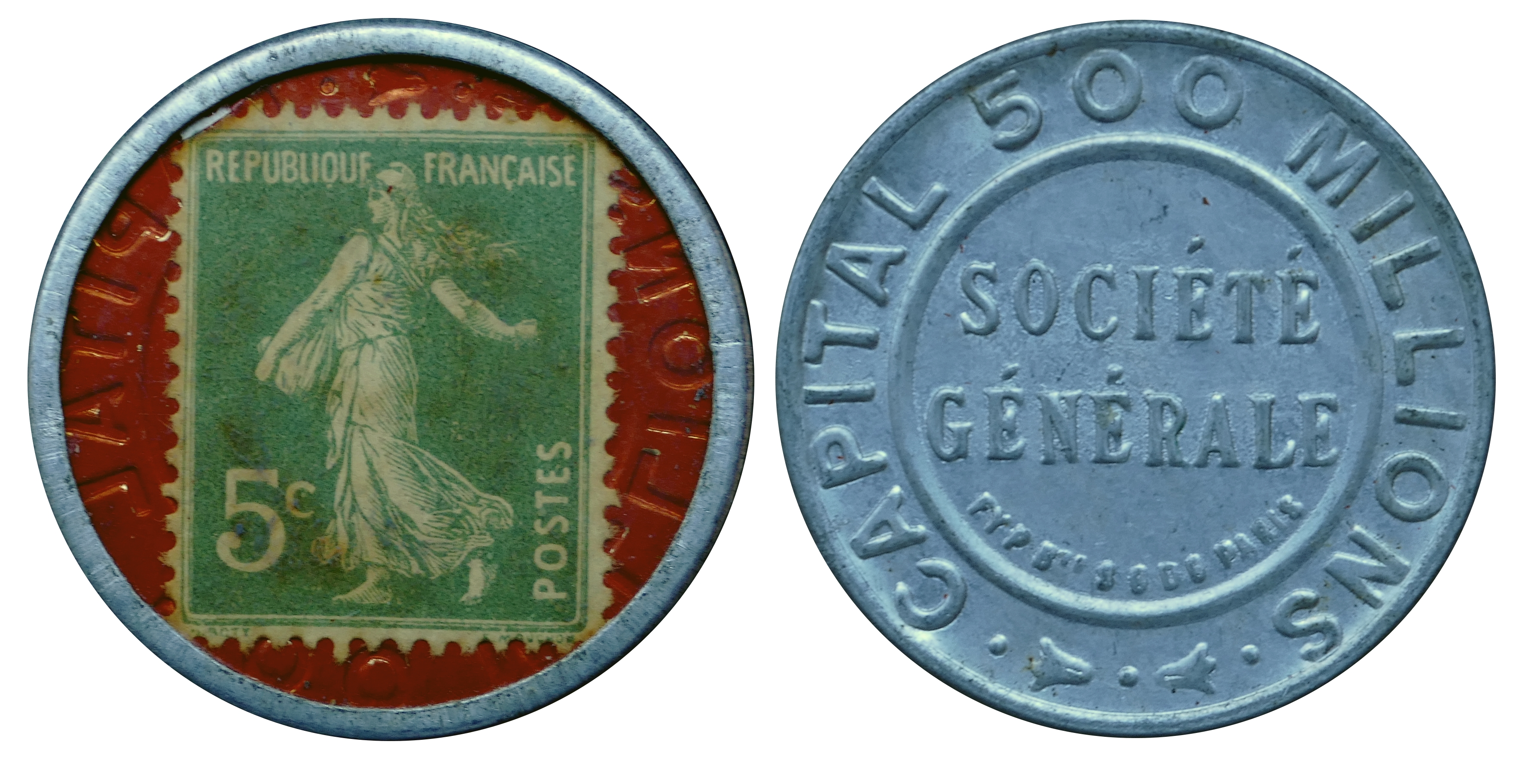 Timbre monnaie émis par la banque Société Générale en France vers 1920. Valeur 5 centimes. Diamètre : 32 mm. Collection personnelle.